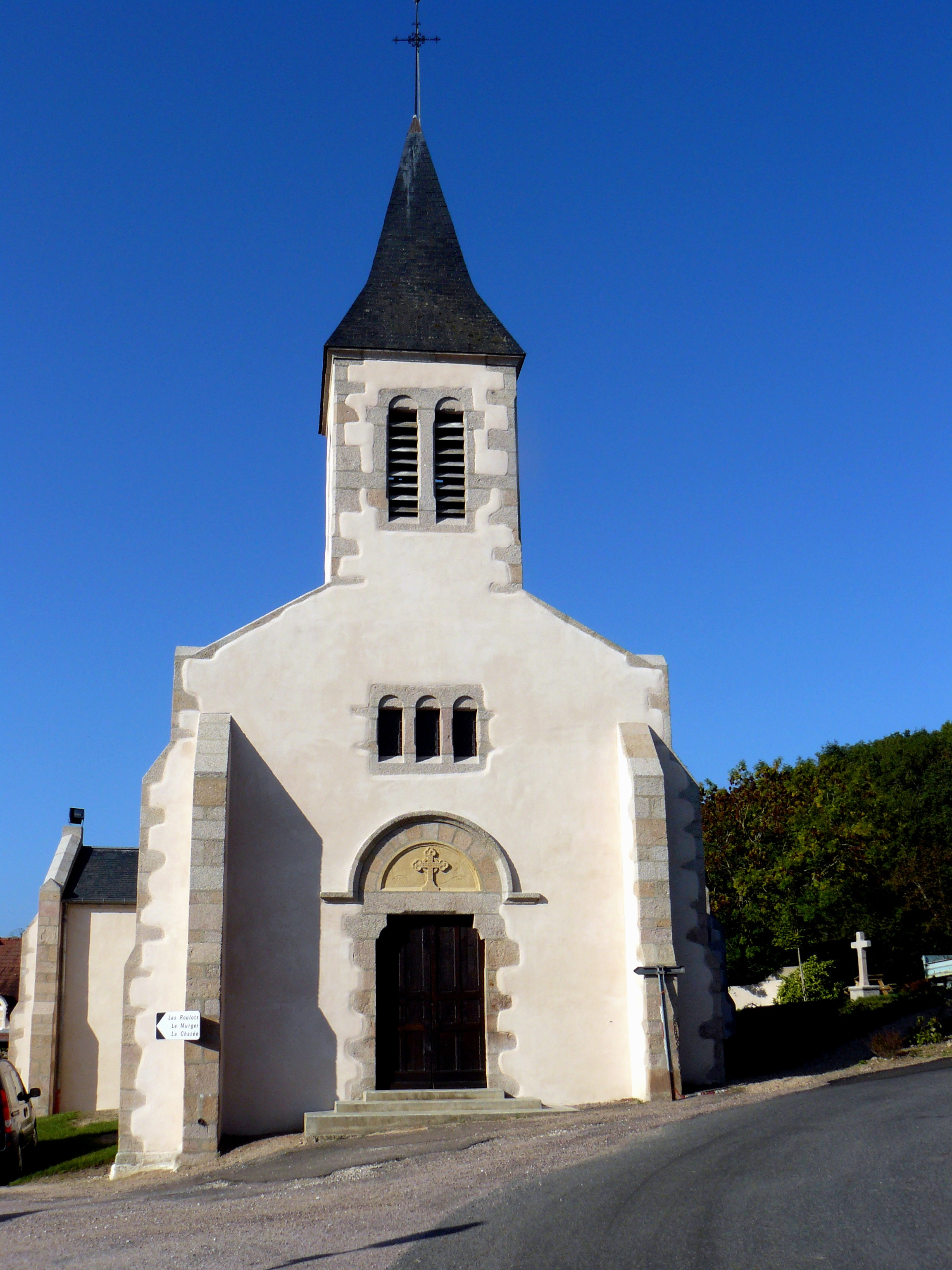 L'église de La Chapelle-sous-Uchon (Saône-et-Loire, France)